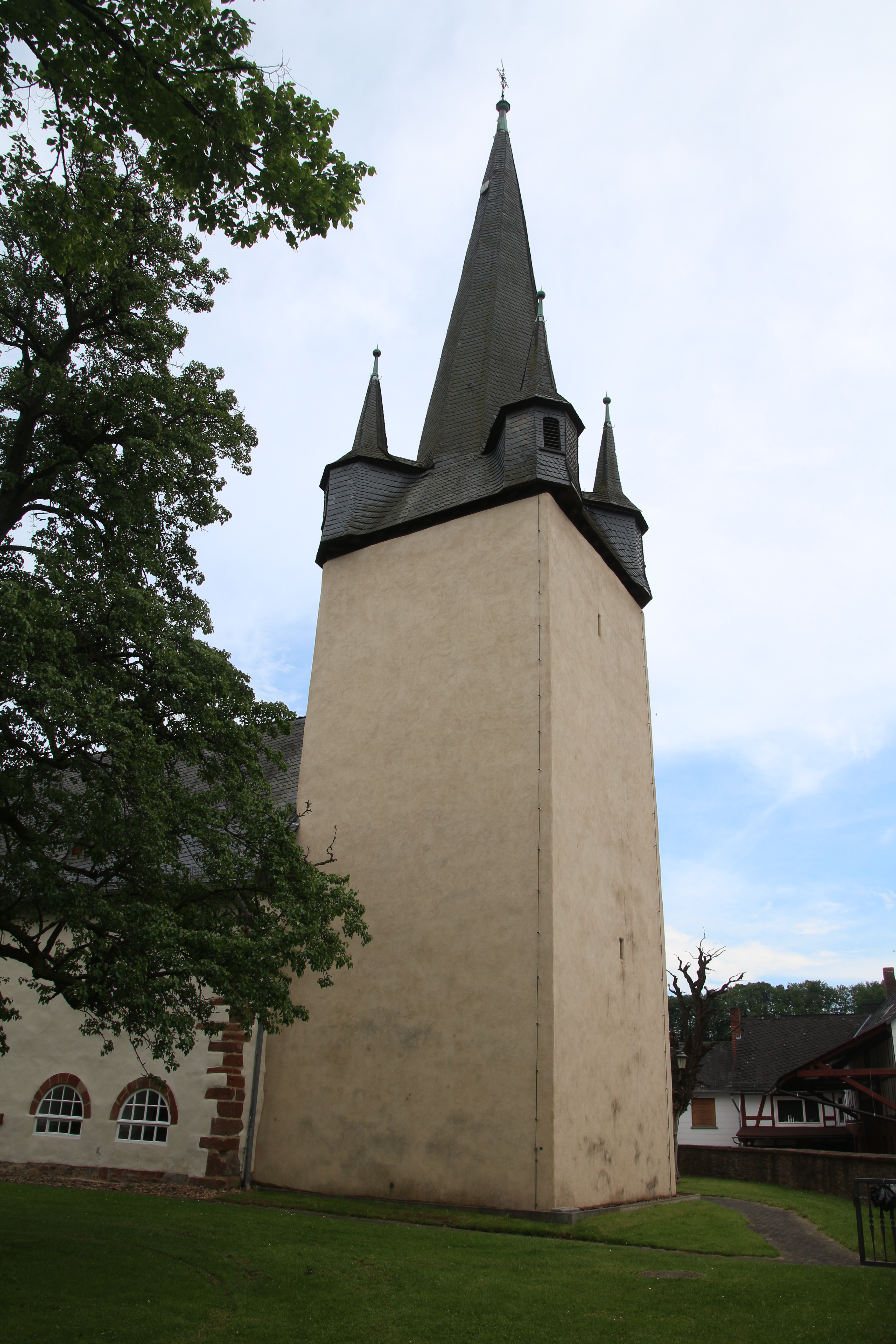 Siehe Bild und Dateiname